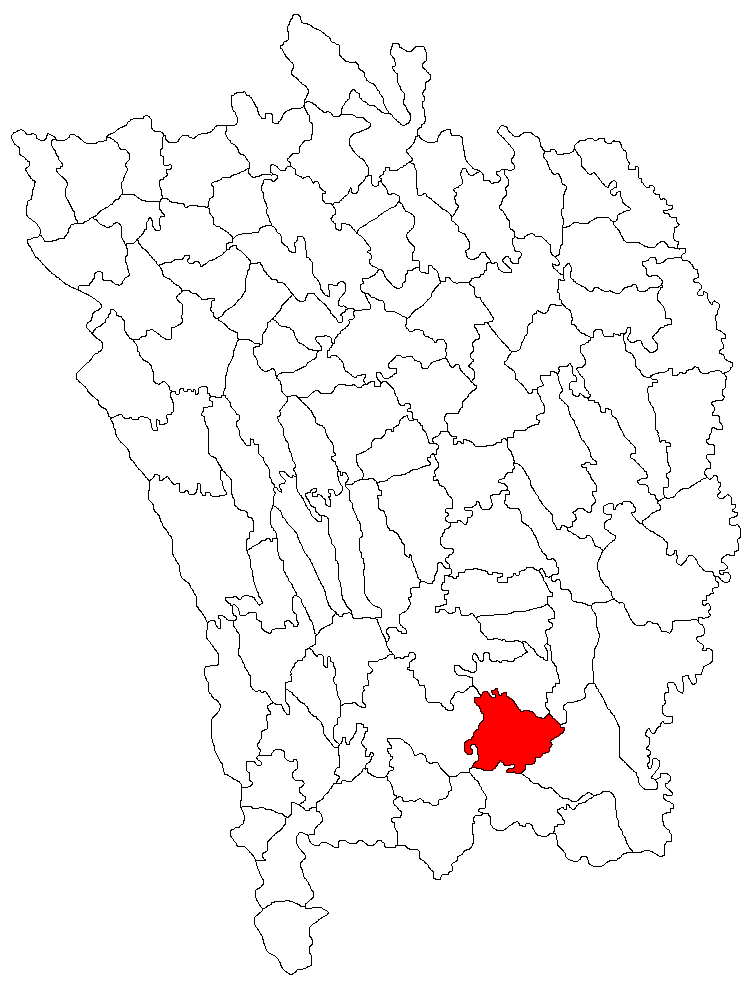 Categorie:Hărţi ale judeţului Vaslui